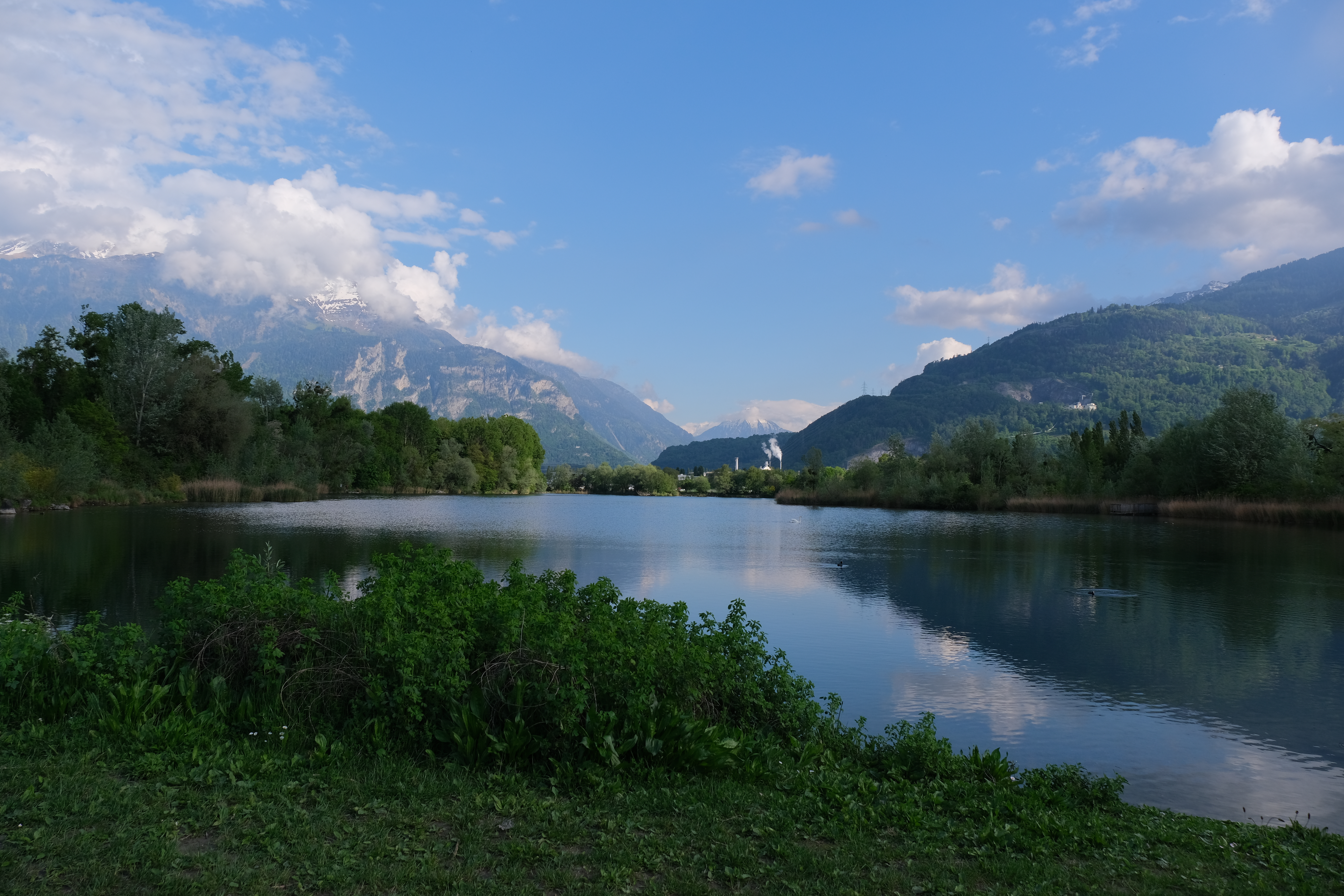 L'étang des Mangettes à Monthey en 2020.